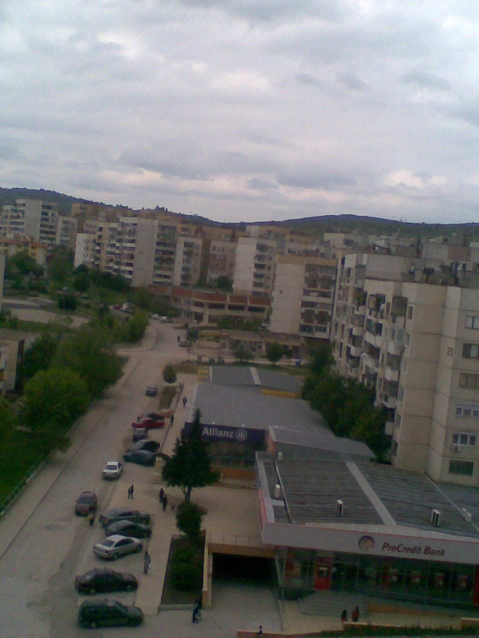 Лицензиране